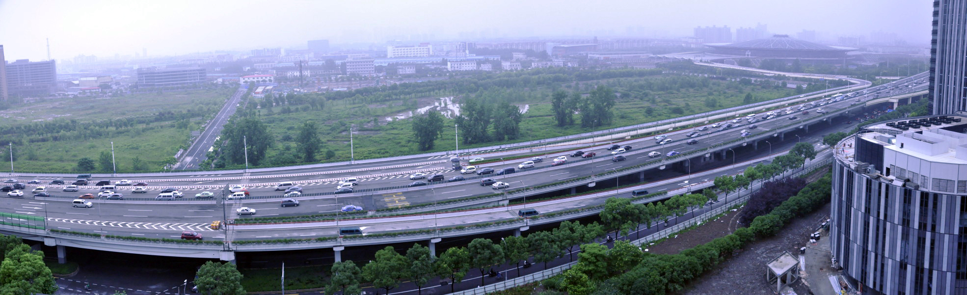 沪闵高架路柳州路下匝道